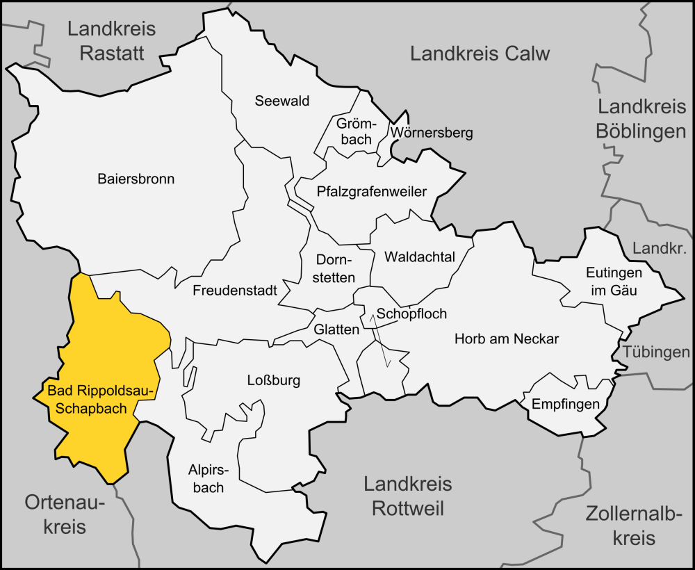 Karte der Gemeinde Bad Rippoldsau-Schapbach im Landkreises Freudenstadt